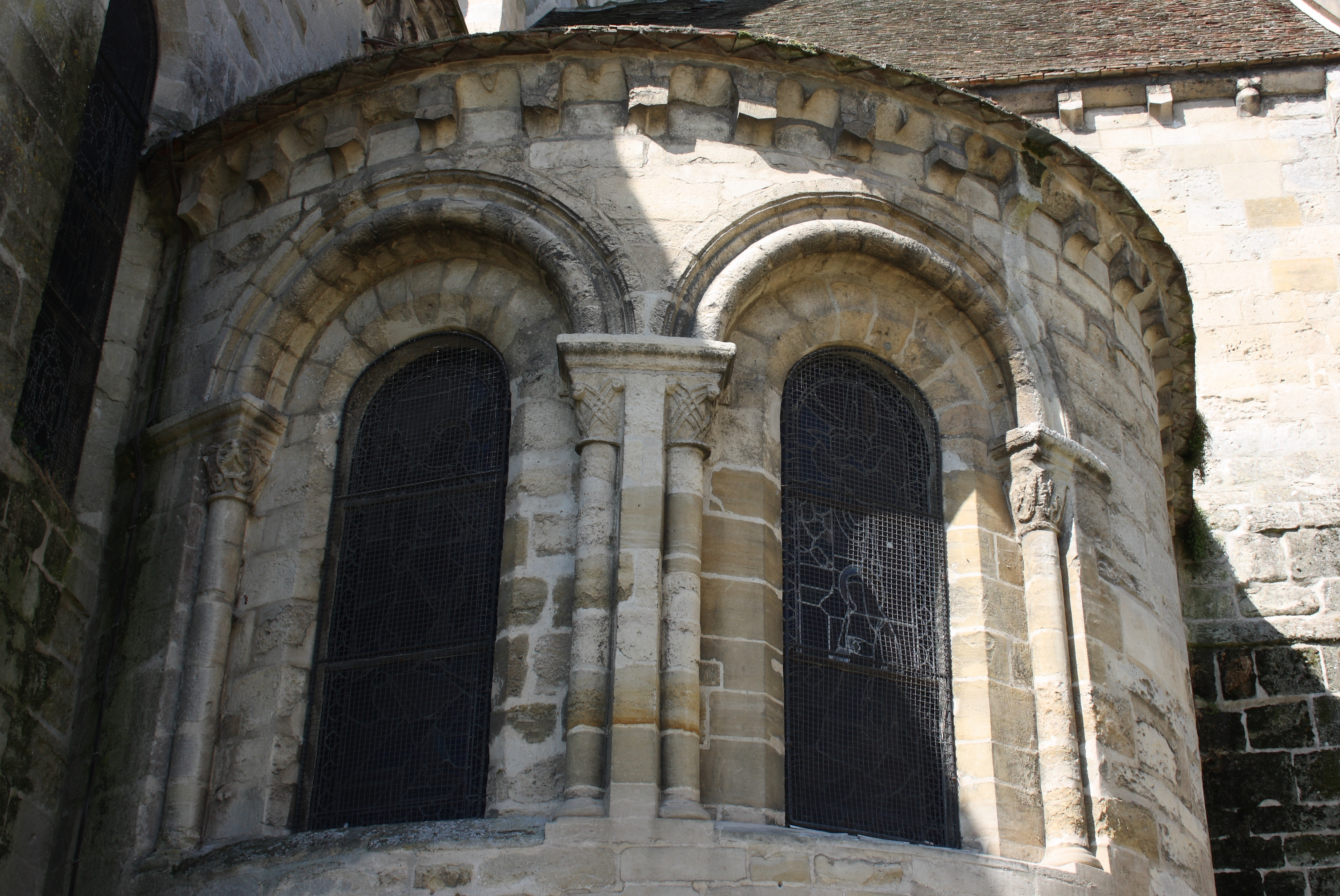 Katholische Pfarrkirche Notre-Dame-de-l'Assomption in Auvers-sur-Oise im Département Val d'Oise (Île de France), erbaut im 12./13. Jahrhundert, Seitenkapelle aus dem 11./12. Jahrhundert